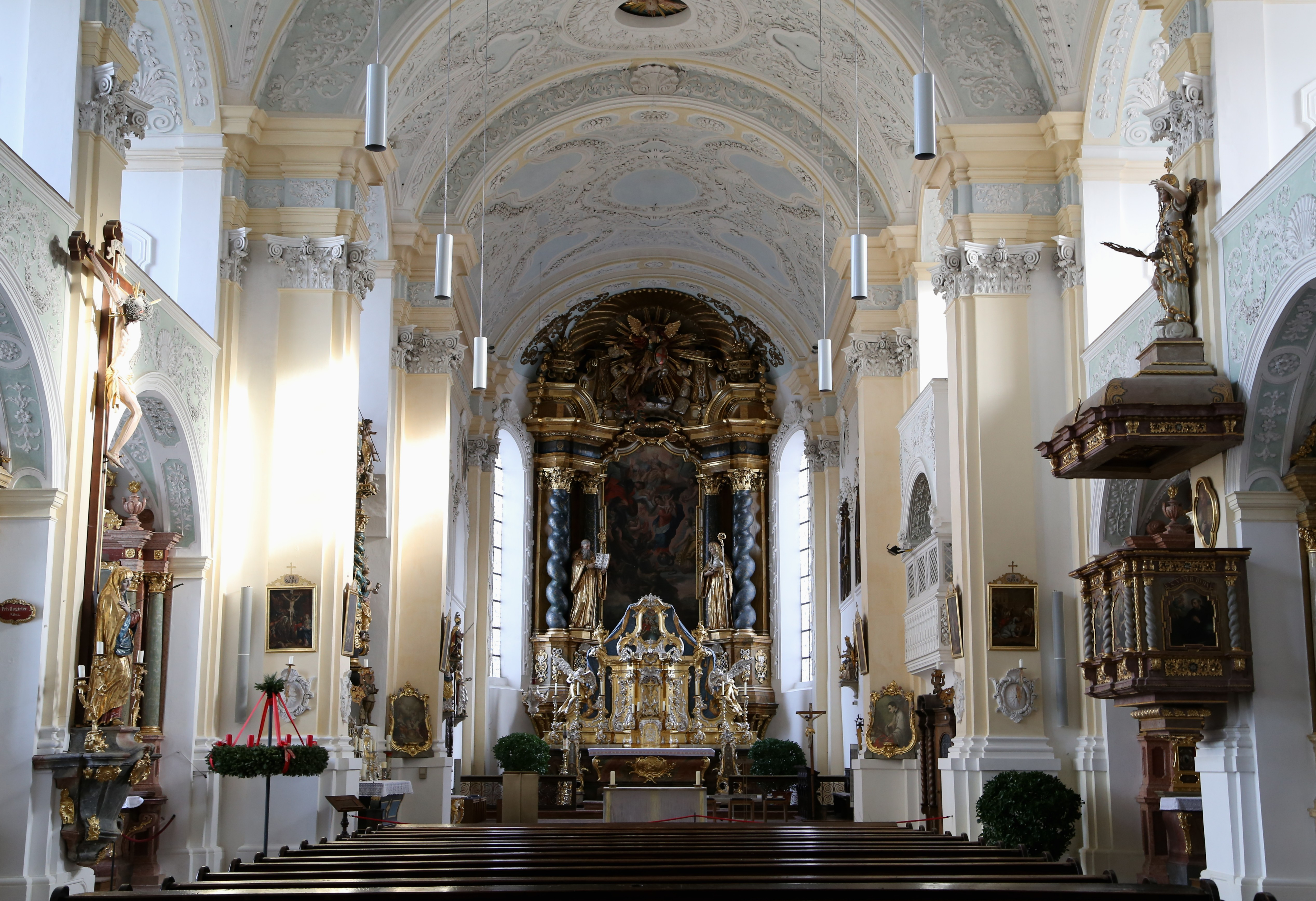 Kloster Attel, ehemalige Klosterkirche, jetzt katholische Pfarrkirche St. Michael. Barocke Wandpfeileranlage mit halbrund geschlossenem Chor und Nordturm mit gekuppelter Laterne, 1713/1715, Turmunterbau mittelalterlich.